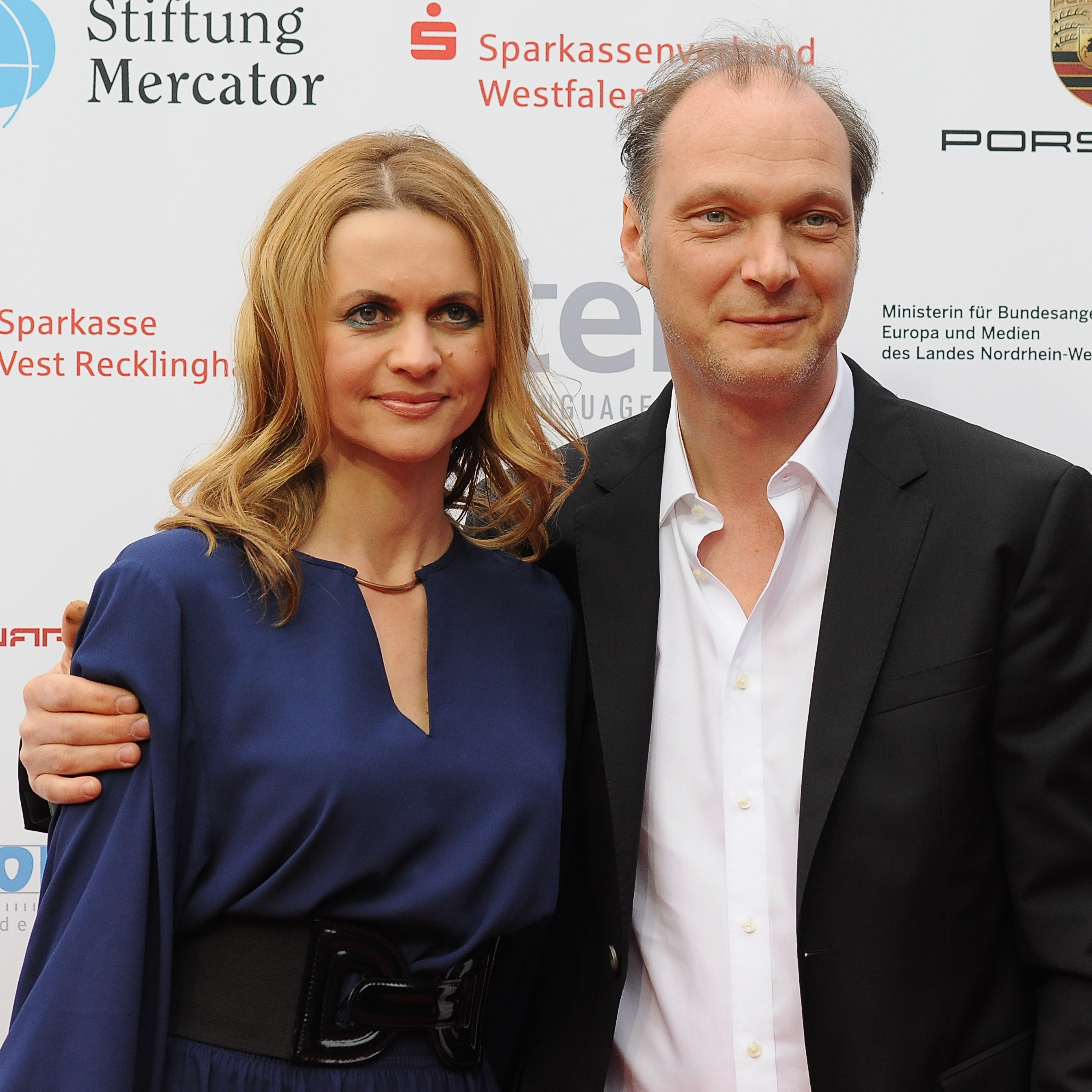 Das Schauspieler-Ehepaar Christine Sommer und Martin Brambach bei der Verleihung des Grimme-Preises 2014.